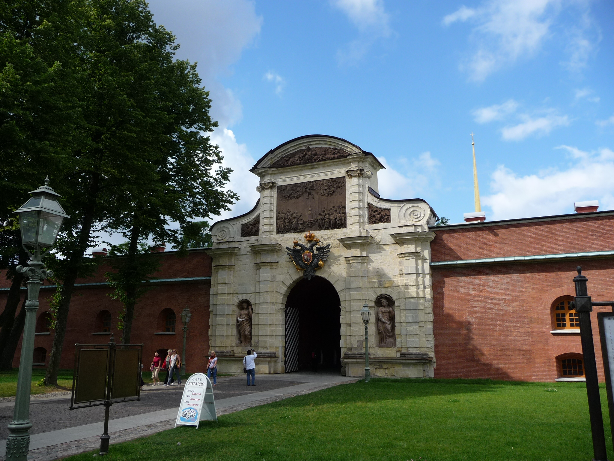 Fortress-p1030561.jpg